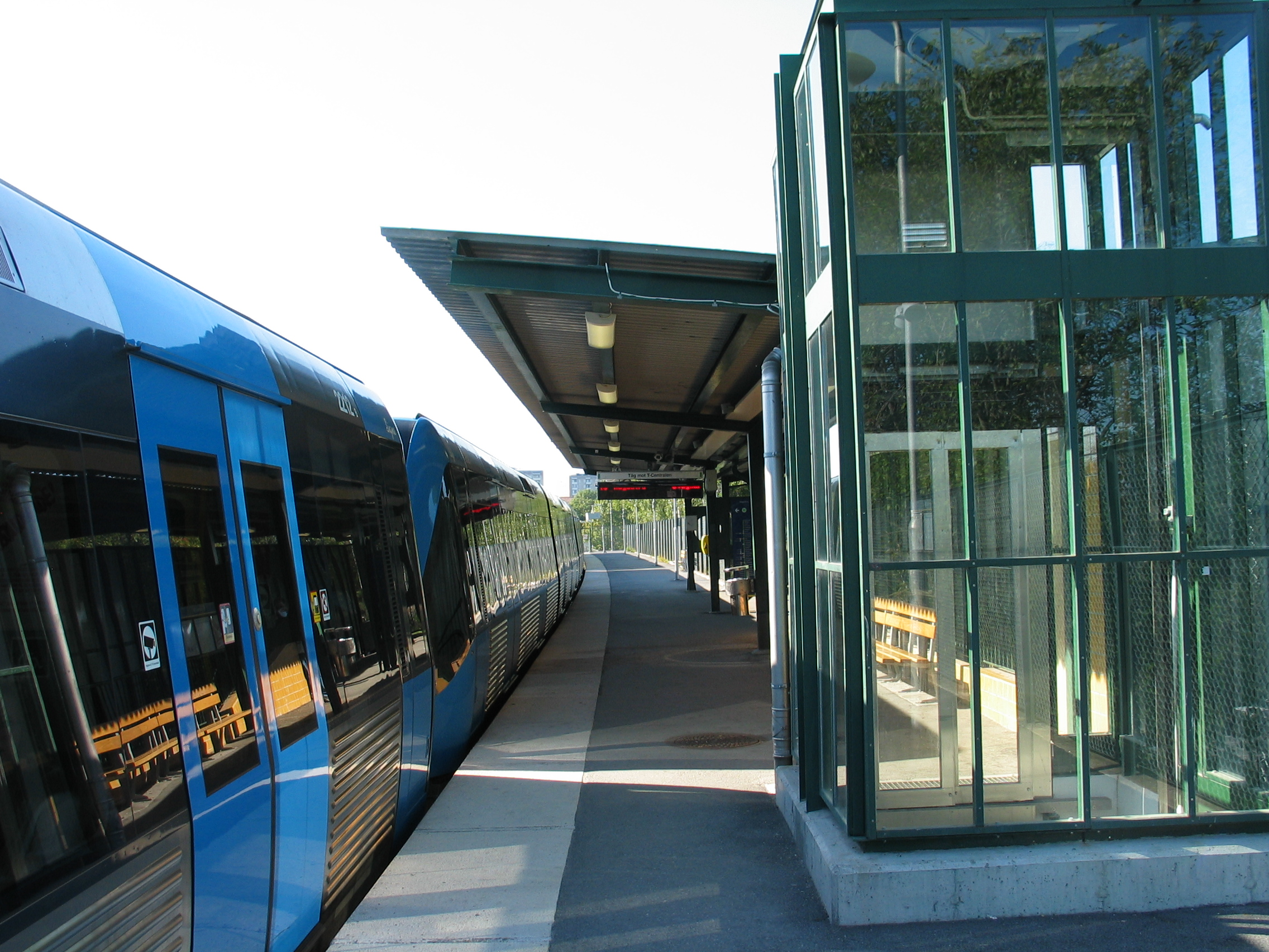 Johannelund, a metro station in Stockholm, Sweden.